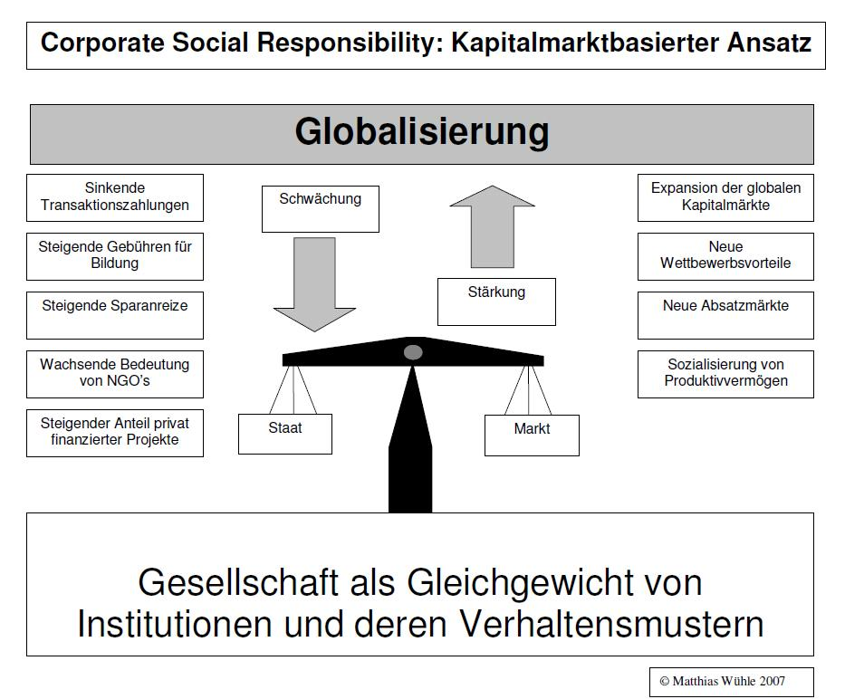 CSR Kapitalmarktmodell